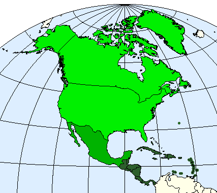 Diferentes conceptos de lo que se considera como Norteamérica.